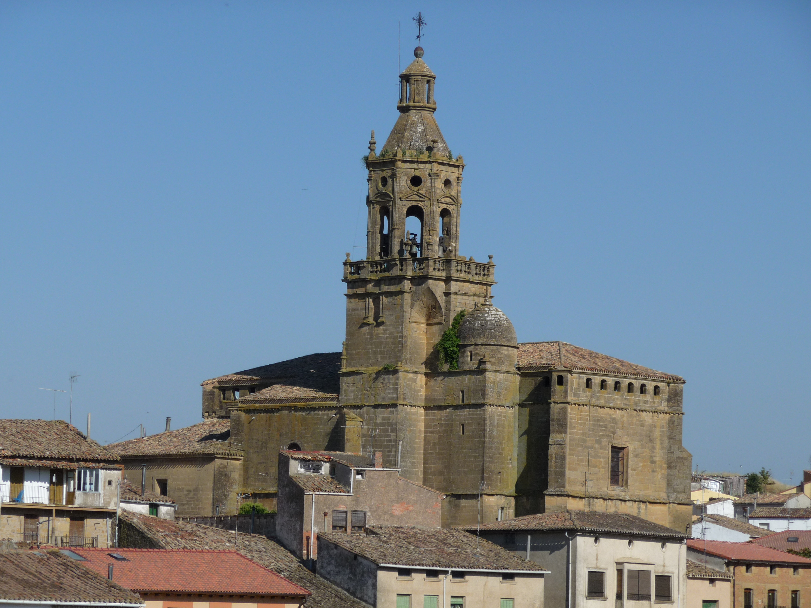 Iglesia de la Ascensión de San Asensio. La Rioja. España.